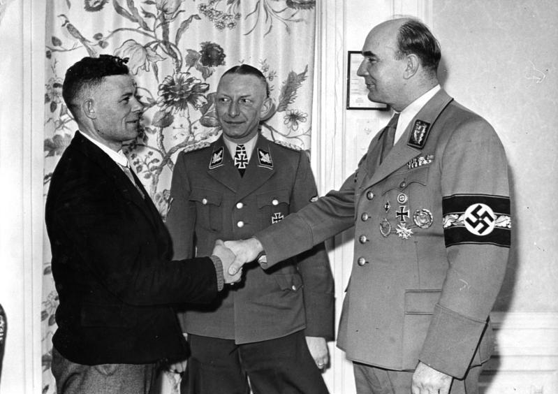 This description has been identified as biased or incorrect: nazi propaganda„Lodz, Millionster Umsiedler im Wartheland Ueber eine Million deutsche Umsiedler im Wartheland. Im Zusammenhang mit der vor 4 Jahren eingeleiteten völkischen Sicherung des Deutschen Lebensraumes im Osten durch die Heimholung der Aussendeutschen Volksgruppen und ihre Sesshaftmachung in den erweiterten Reichsgrenzen hat der Reichsgau Wartheland einen bedeutsamen Abschnitt seiner volkstumpolitischen Arbeit hinter sich gebracht. Gauleiter und Reichsstatthalter Greiser konnte in diesen Tagen dem Führer, sowie dem Reichsführer SS als Reichskommisar für die Festigung Deutschen Volkstums, melden, dass im Zuge der gegenwärtig vorsichgehenden Umsiedlung der Schwarzmeerdeutschen die Zahl der Deutschen im Wartheland die Millionengrenze erreicht hat. Nach Aufnahme der noch unterwegs befindlichen Schwarzmeerdeutschen wird der Deutsche Bevölkerungsanteil im Wartheland auf 1,1 Millionen steigen. Wir bringen einen Bildbericht aus Umsiedlungslagern im Warthegau. UBz. Im Rahmen einer Massenkundgebung der NSDAP in Litzmannstadt, zu der sich über 30000 Männer und Frauen eingefunden hatten, nahm Gauleiter Greiser die feierliche Einweisung des millionsten Deutschen, einem 39 jährigen Bauern aus dem Gebiet Taganrog, in sein Gaugebiet vor. Ritterkreuzträger SS-Brigadeführer Reinefahrt (mitte) stellte dem Gauleiter den Bauern vor. Fot. Hoffmann 17.3.44“ Abgebildete Personen: Greiser, Arthur: Senatspräsident von Danzig, Gauleiter Warthegau, Deutschland Reinefarth, Heinz Dr.: SS-Obergruppenführer, Ritterkreuz (RK), Waffen-SS, Polizeigeneral, MdL, Bundesrepublik Deutschland (GND 128604689)